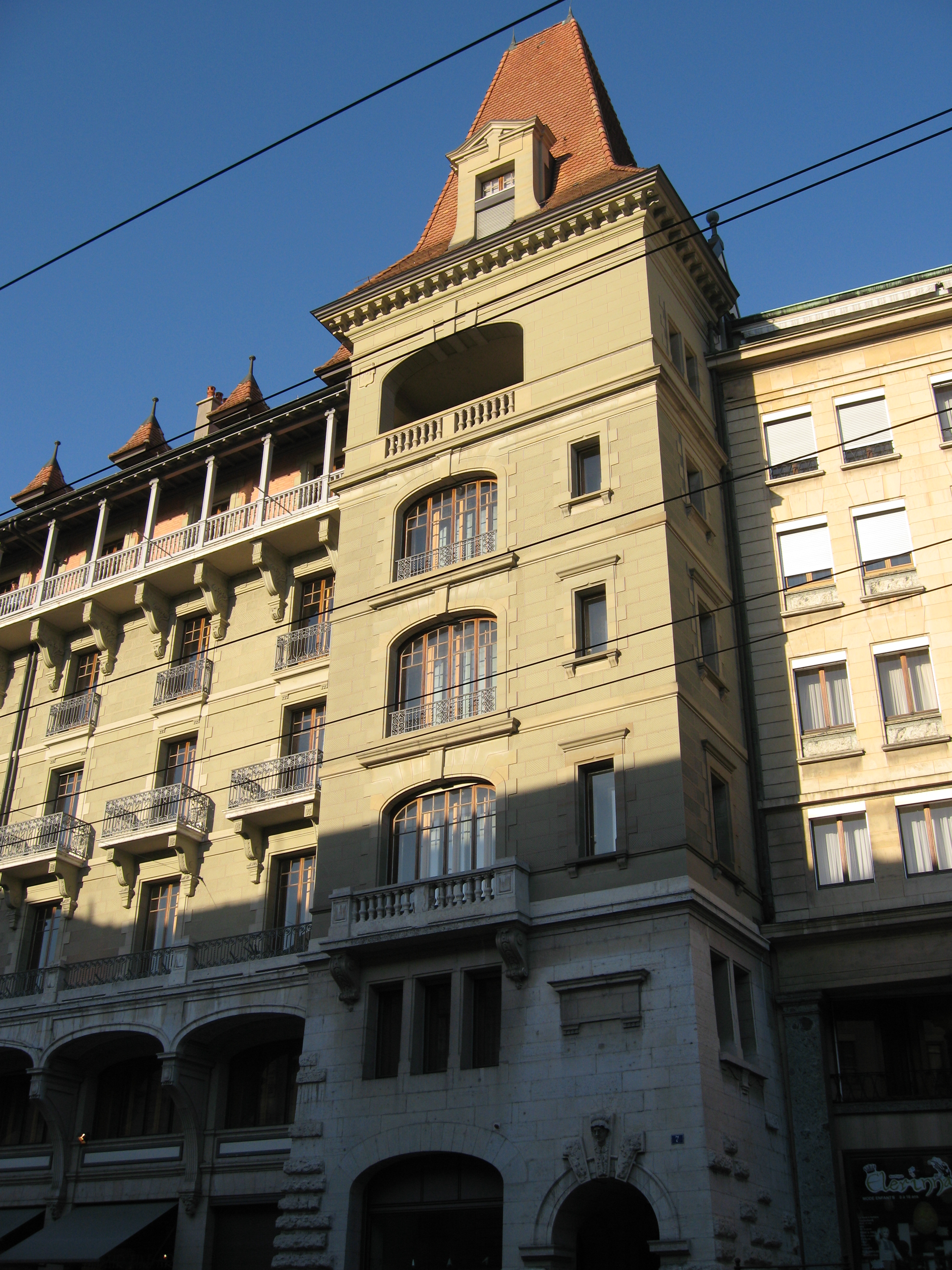 Bâtiment se situant à l'emplacement de l'ancienne Tour Thélusson - dite aussi Tour de l'Escalade. (Construction 1903) L'ancienne tour constituait un édifice défensif intégré aux fortifications de Marcossey (XIVe siècle). C'est non loin de cette tour que les Savoyards escaladèrent la courtine.